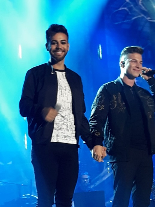 Agoney hernandez raoul vazquez biskaia arena 24-6-18 2 cantando manos vacias